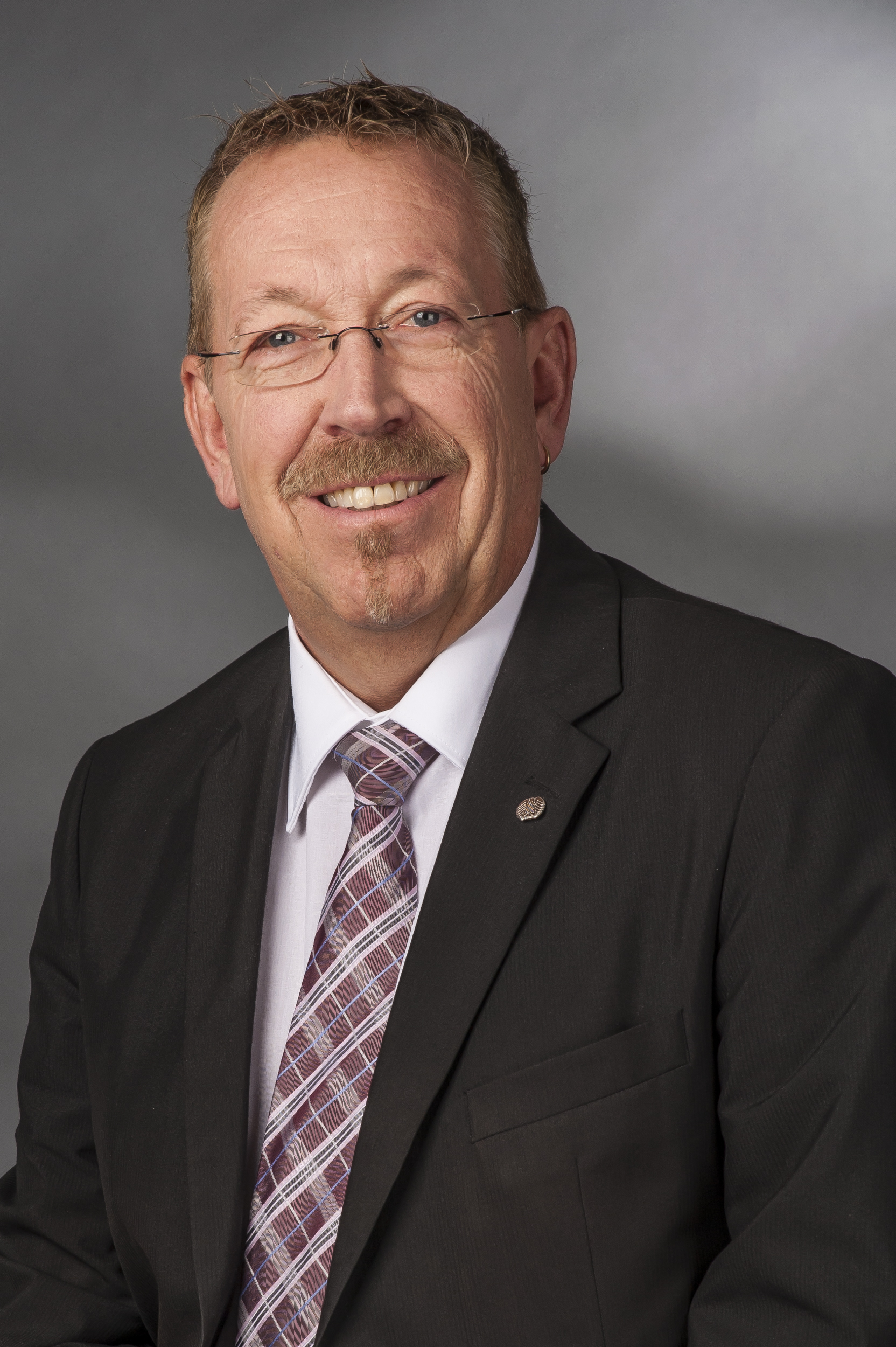 Karl-Heinz Brunner (* 14. März 1953 in München) ist ein deutscher Politiker (SPD). Seit der Bundestagswahl 2013 ist er Mitglied des deutschen Bundestages.